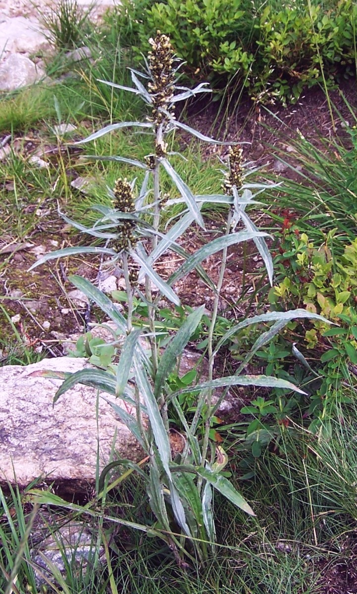 Gnaphalium norvegicum (pl. szarota norweska), habitat: Tatra Mountains, Opalony Wierch, Świstówka Roztocka